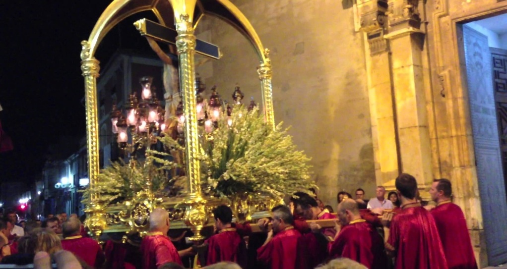 El Crist durant el moment culminant de la seva processó, l'entrada a l'església.